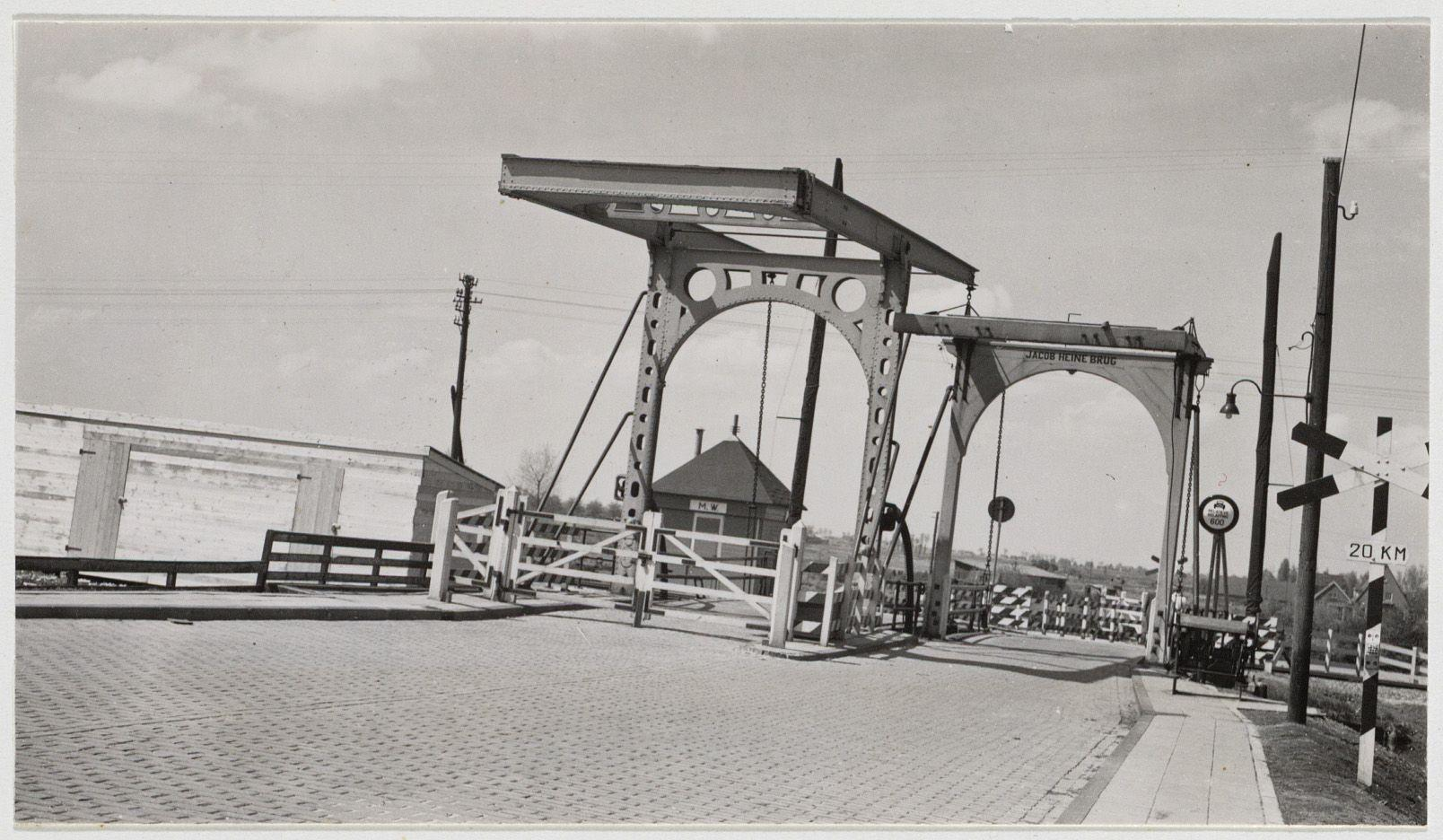 Beschrijving Amsterdamse Bos Amstelveen, gemeente Nieuwer-Amstel. Nieuwe Meerlaan, gezien in westelijke richting naar Amstelveenseweg en de Jacob Heinebrug Documenttype foto Vervaardiger Eck, J. van (Jacobus, 1873-1946) Collectie Collectie J. van Eck: foto's Datering 10 juli 1939 Geografische naam Amstelveen Amsterdamse Bos Nieuwe Meerlaan (Amstelveen) Inventarissen Afbeeldingsbestand A01634001724 Generated with Dememorixer